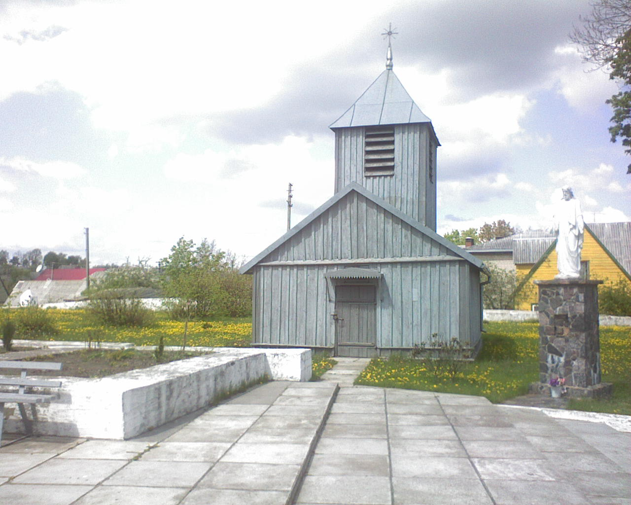 Užvenčio bažnyčios varpinė